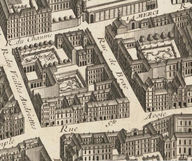 Extrait du plan de Paris dit "Plan de Turgot"; levé et dessiné par Louis Bretez, gravé par Claude Lucas, 1739